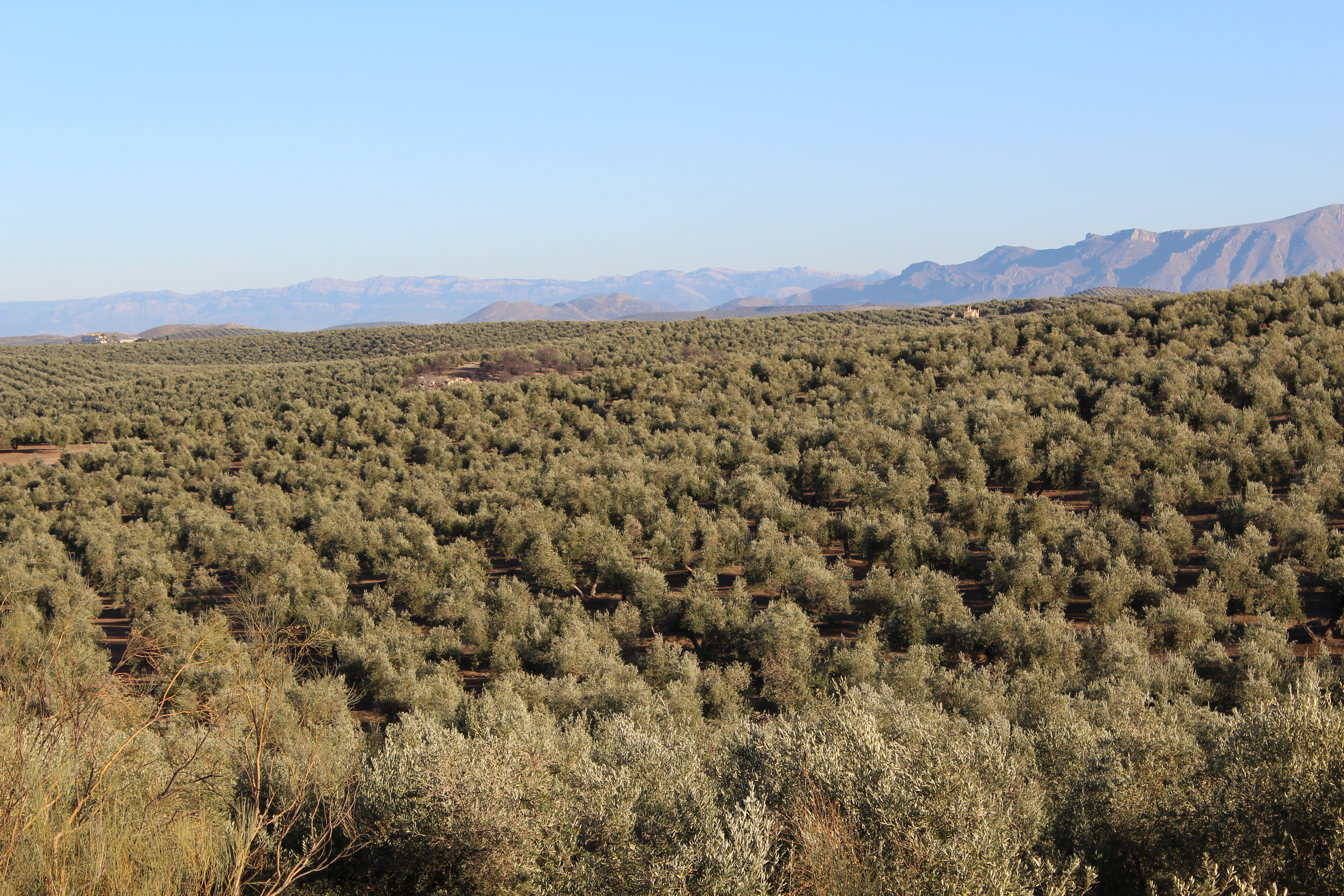 Vista de la Serrezuela de Bedmar y de la Sierra de Cazorla al fondo a la izquierda, desde la campiña oriental giennense.